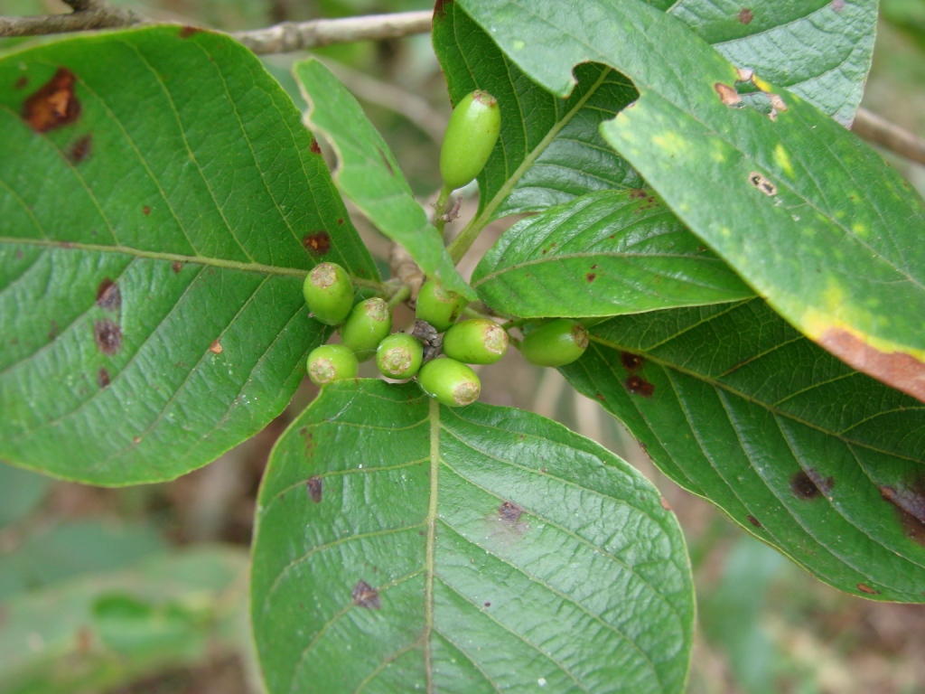 Coussarea platyphylla Müll. Arg. - RUBIACEAE - Jardim Botânico de Brasília - Distrito Federal - Brasil.